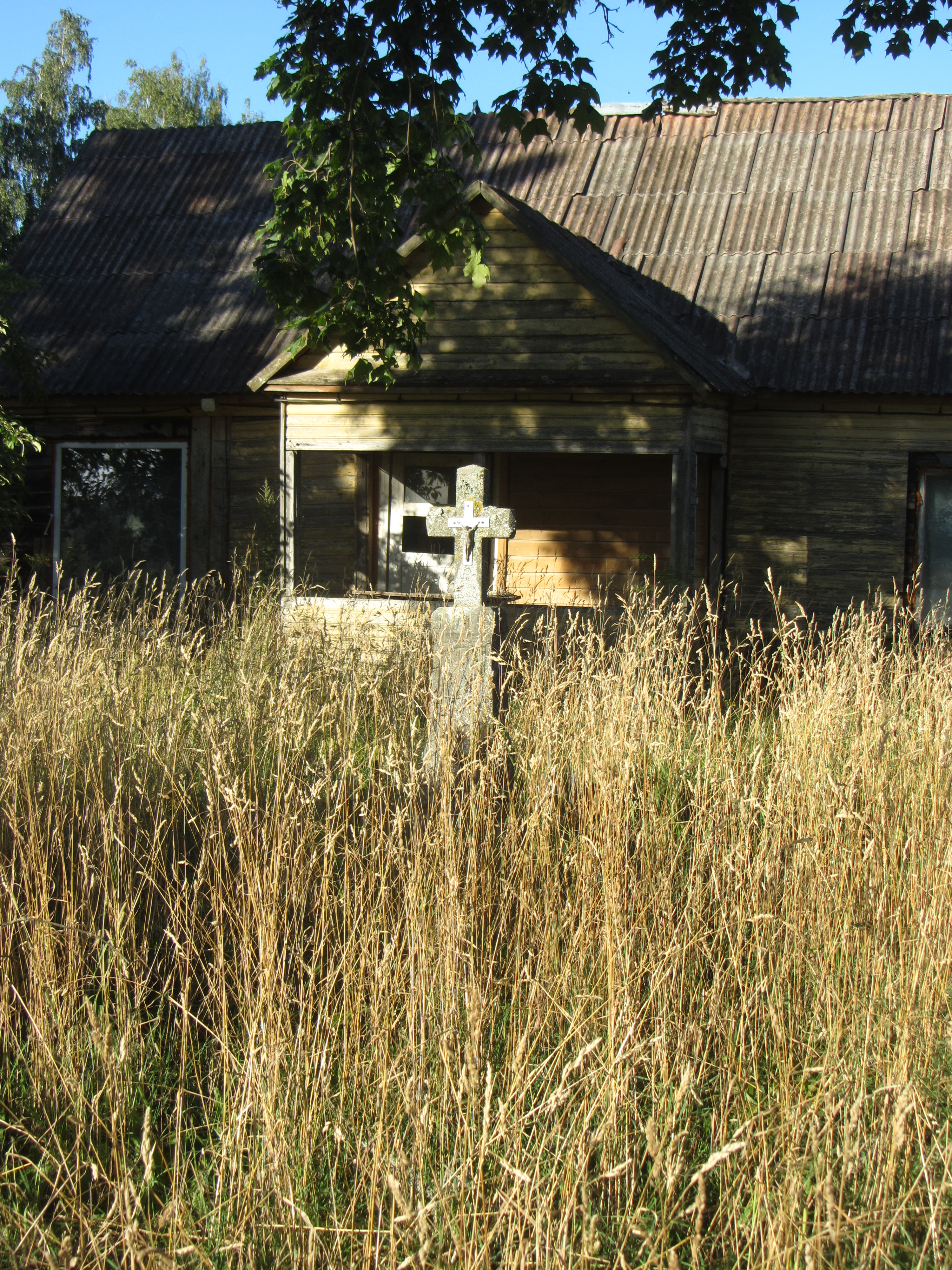 Kamajų sen., Lithuania